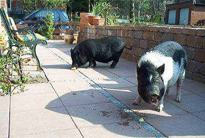 Zwei Minischweine beim fressen. Beide sind zwei Jahre alt. Quelle und Lizenz: Andreas Bertram (Vermutlich Uploader=Urheber)